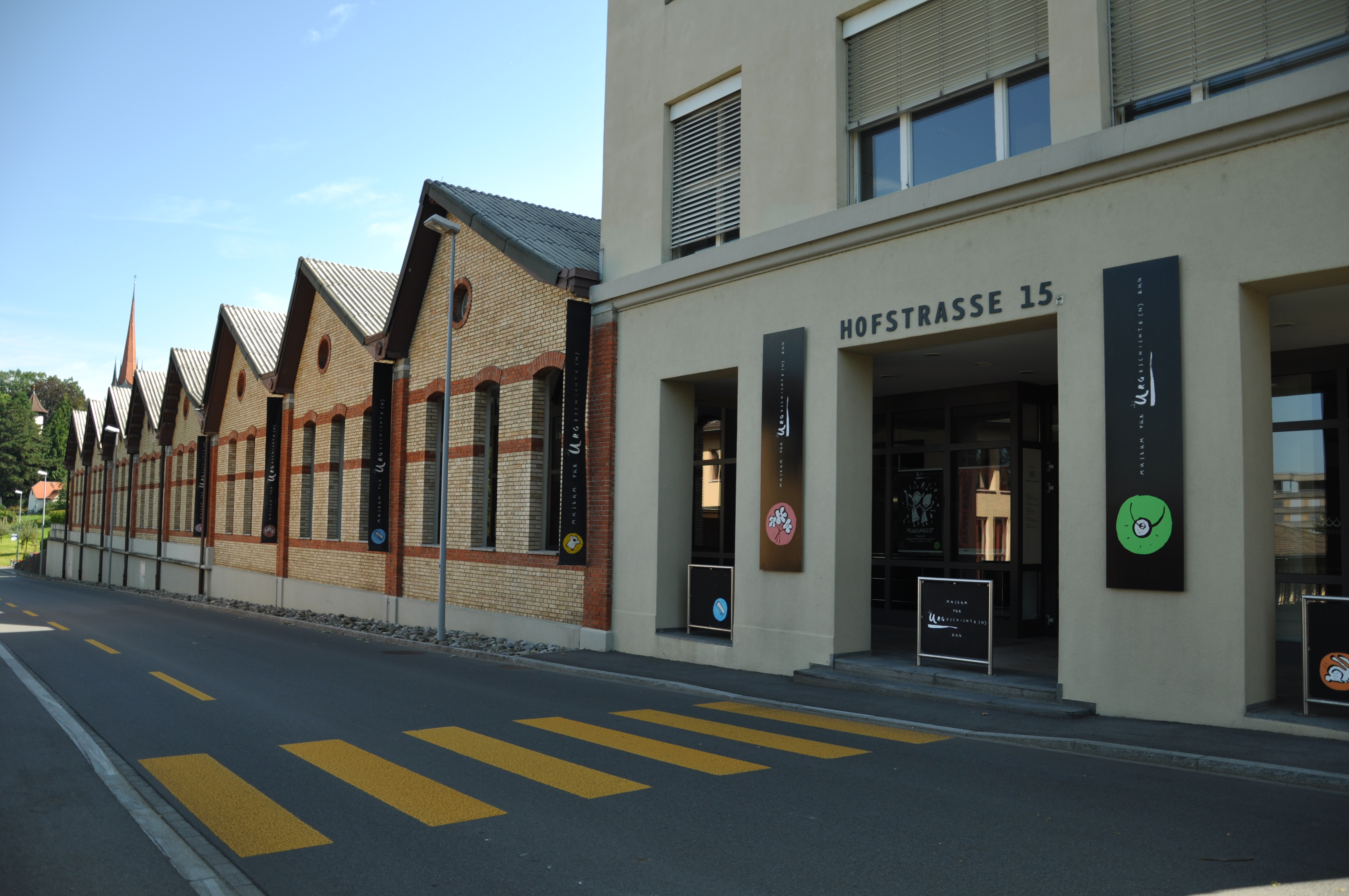 Zug Archiv des Amtes für Denkmalpflege und Archäologie, Archiv für Bauernhausforschung, Museum für Urgeschichte